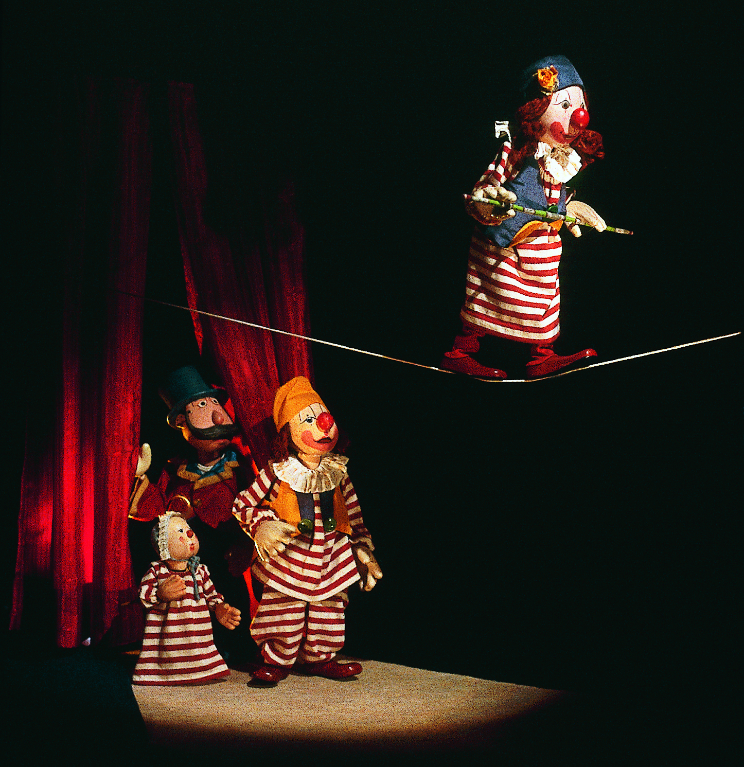 Från föreställningen "August Augusta och lille Augustin"